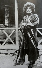 ვაჟა-ფშაველა